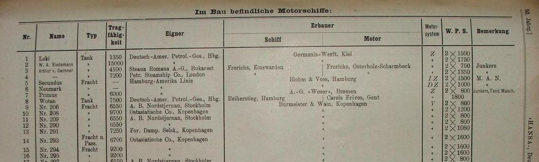 Tabelle mit 1913 im Bau befindlichen Motorschiffe